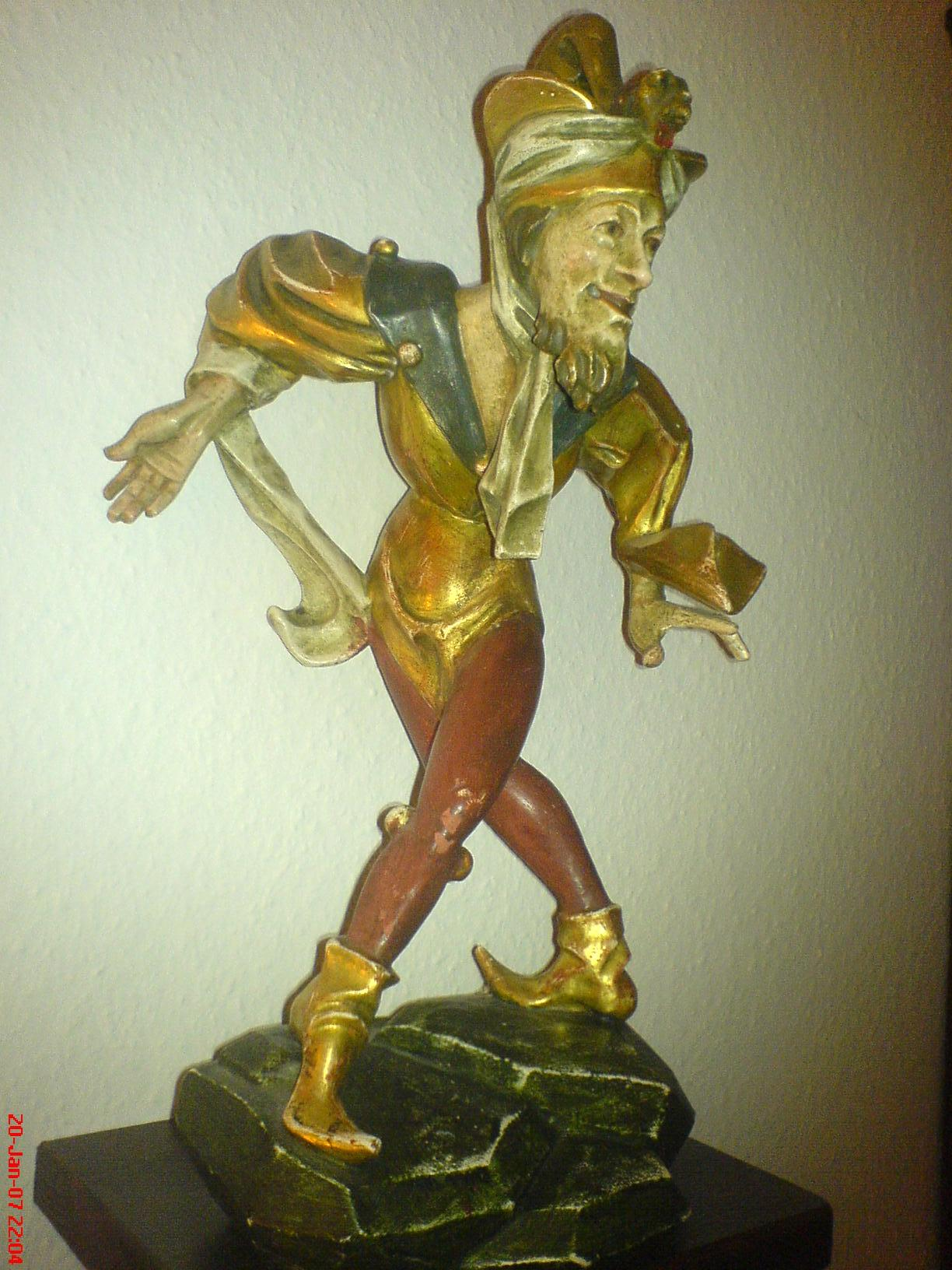 Erasmus Grasser Moriskentänzer